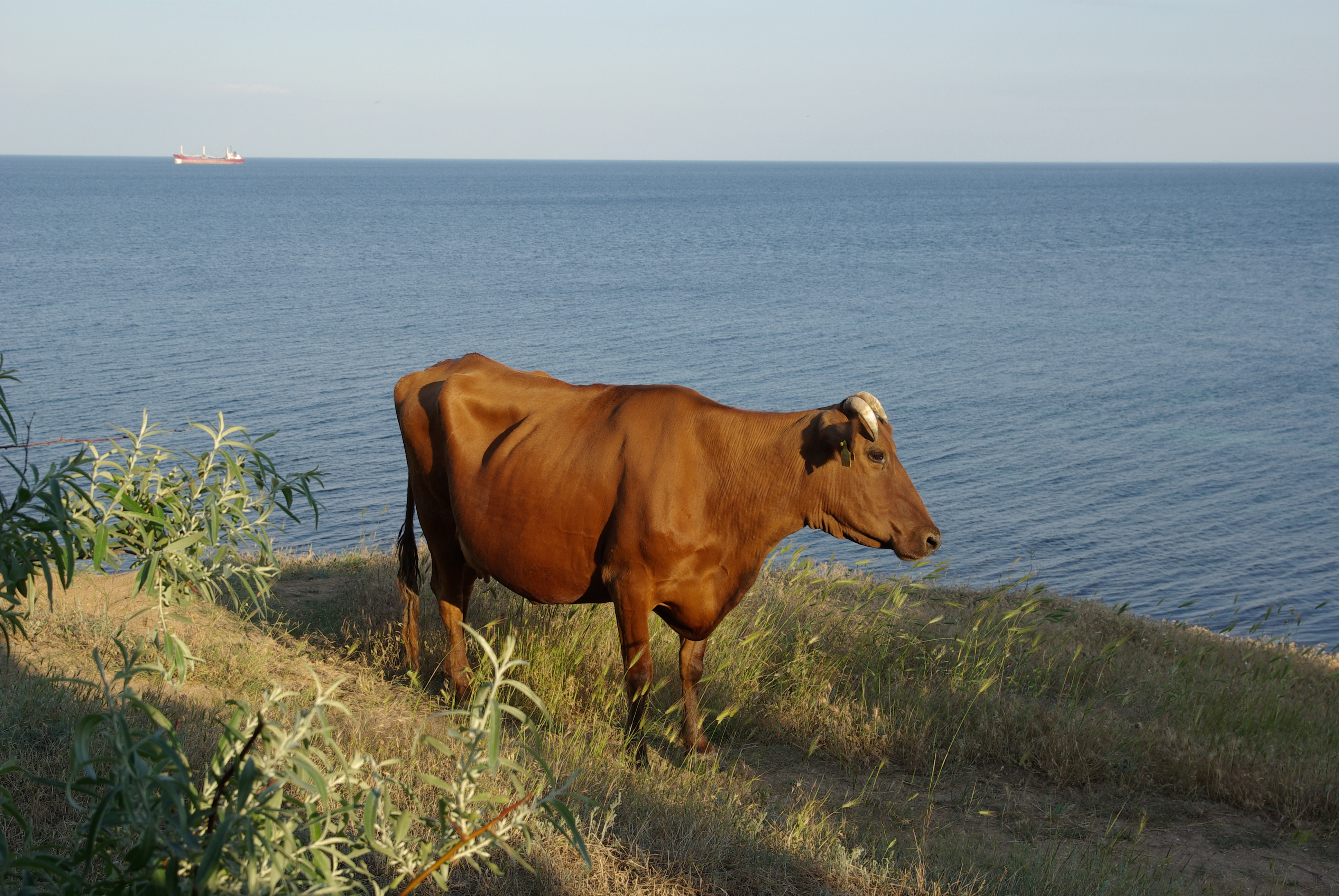 марьинская корова